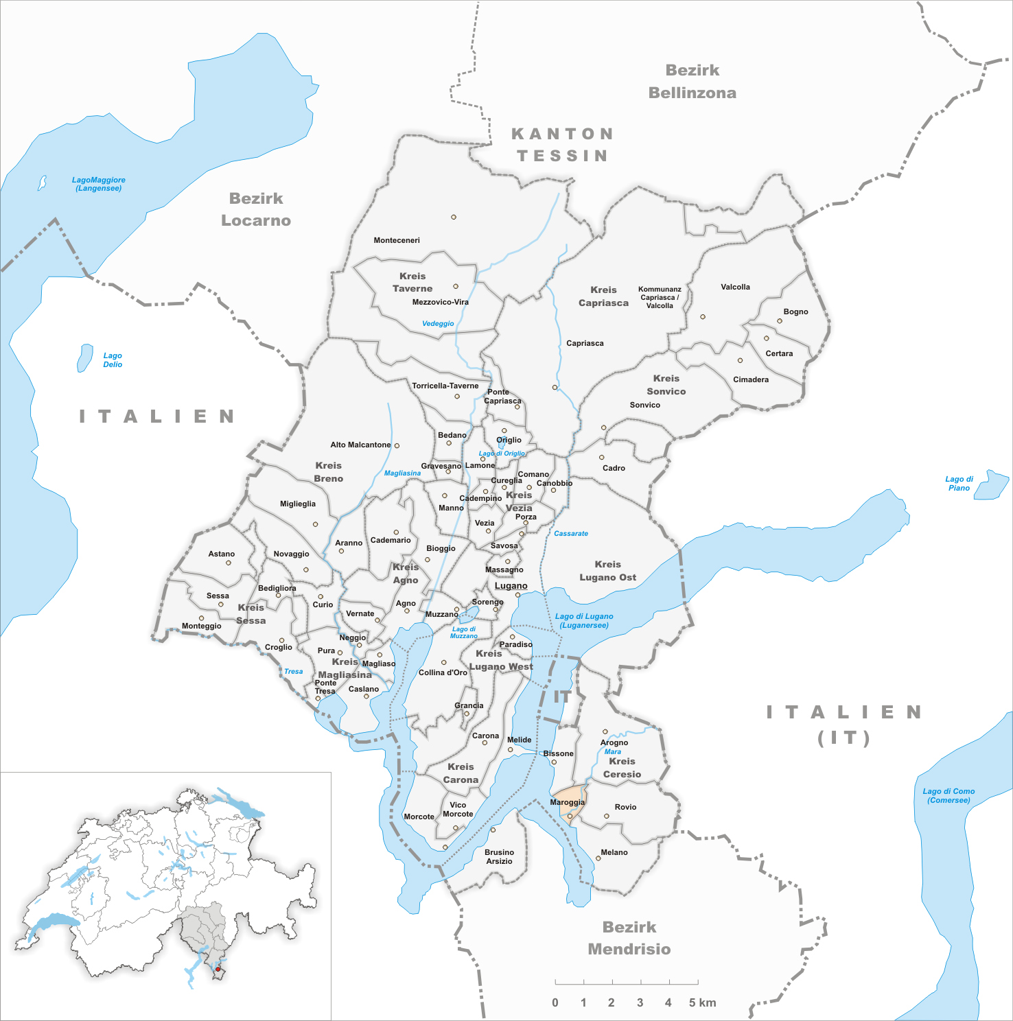 Municipality Maroggia